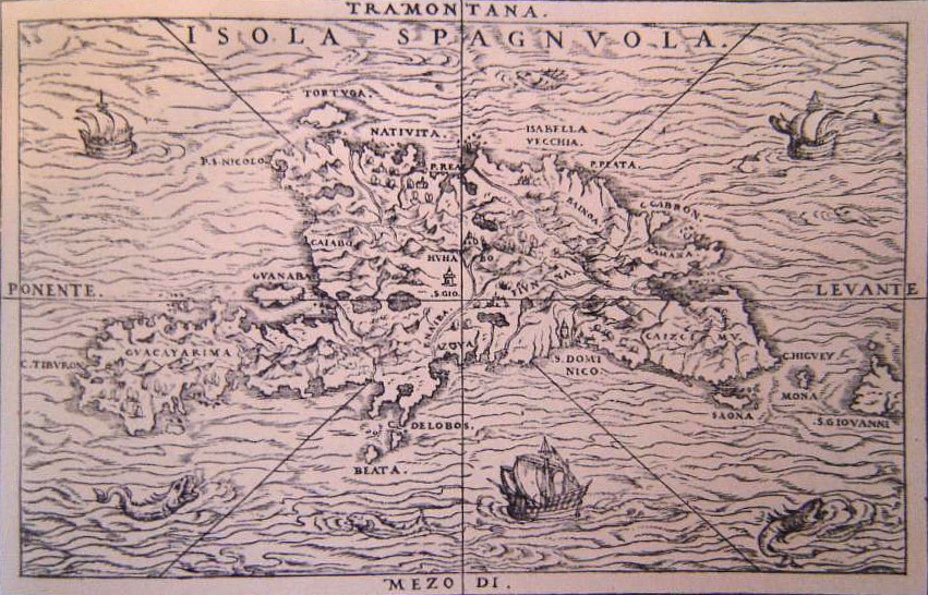 Bearbeitete Version von Image:15thcenturyhispaniola.JPG durch Hd pano